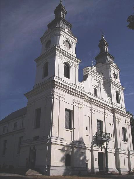 Žemaičių Kalvarijos Švč. Mergelės Marijos Apsilankymo mažoji bazilikaŽemaitėška: Šv. Panelės Marėjės Apsilonkėma bazilika